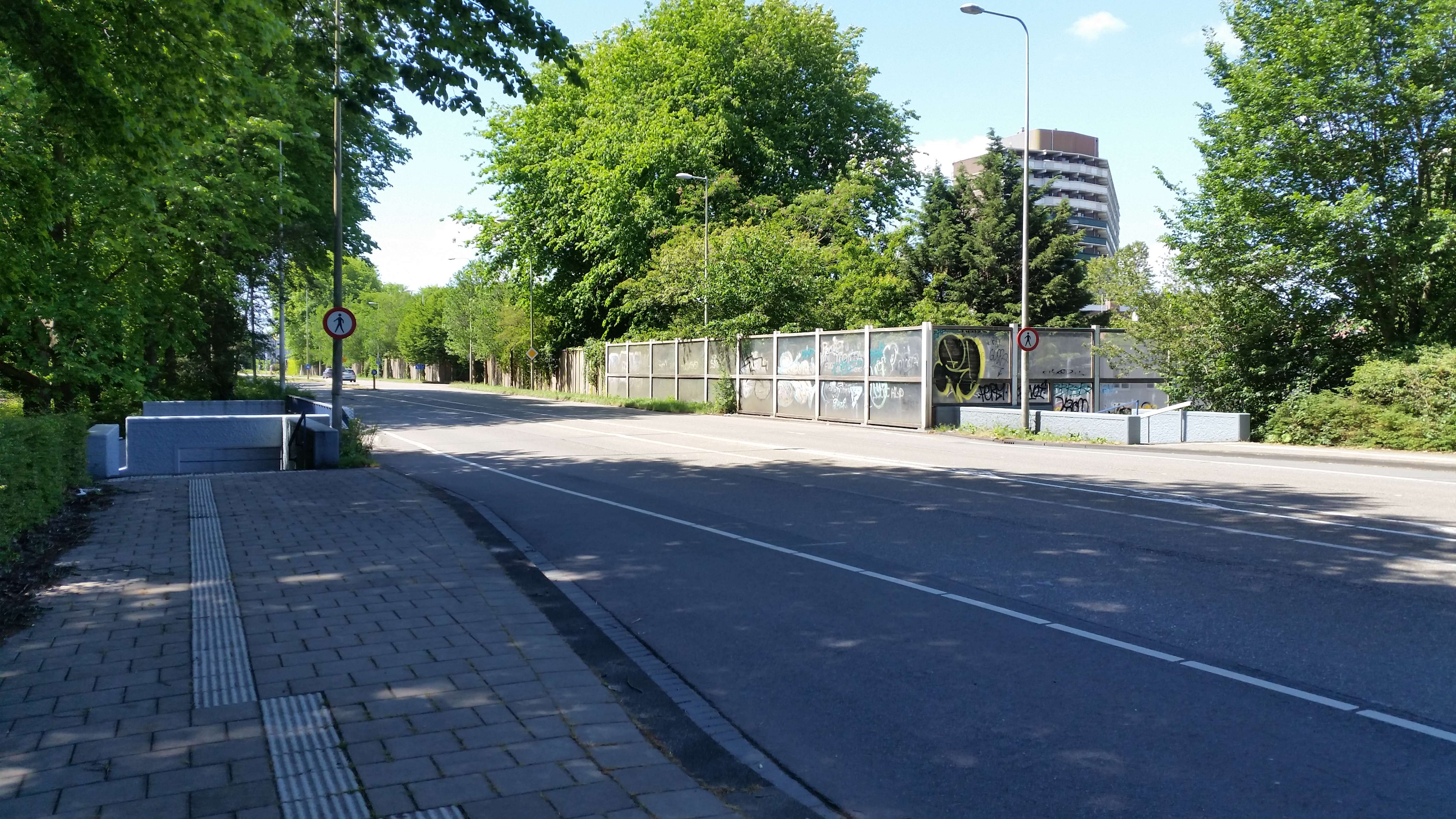 Impressie van Brug 957 (Het Breedbrug) in de Waddenweg, Amsterdam-Noord